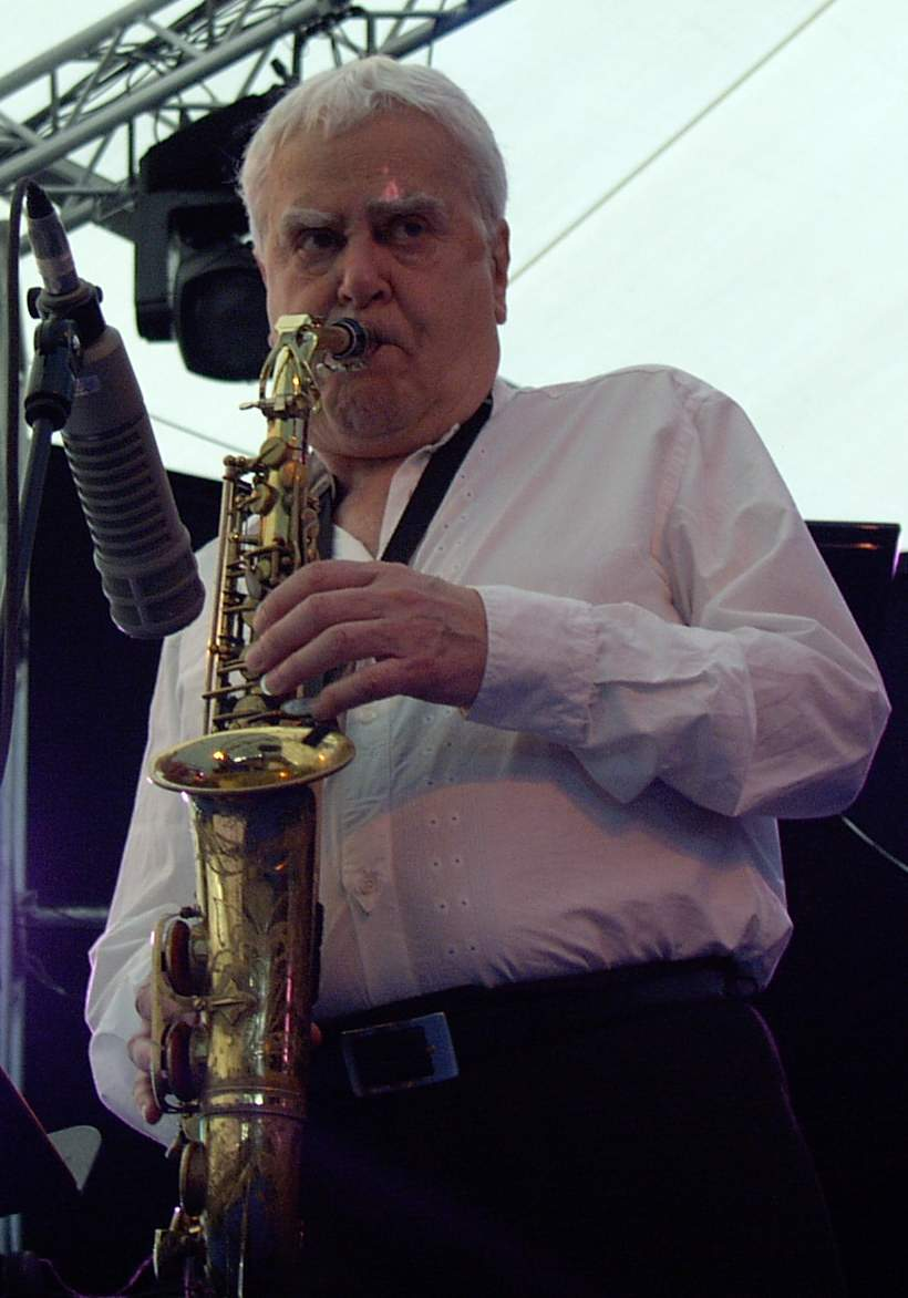 Charlie Mariano bei "Jazz an der Donau" in Straubing, 2003. Möglichkeiten zur Lizenzierung, bitte die nicht-benötigte Variante aus dem Code löschen